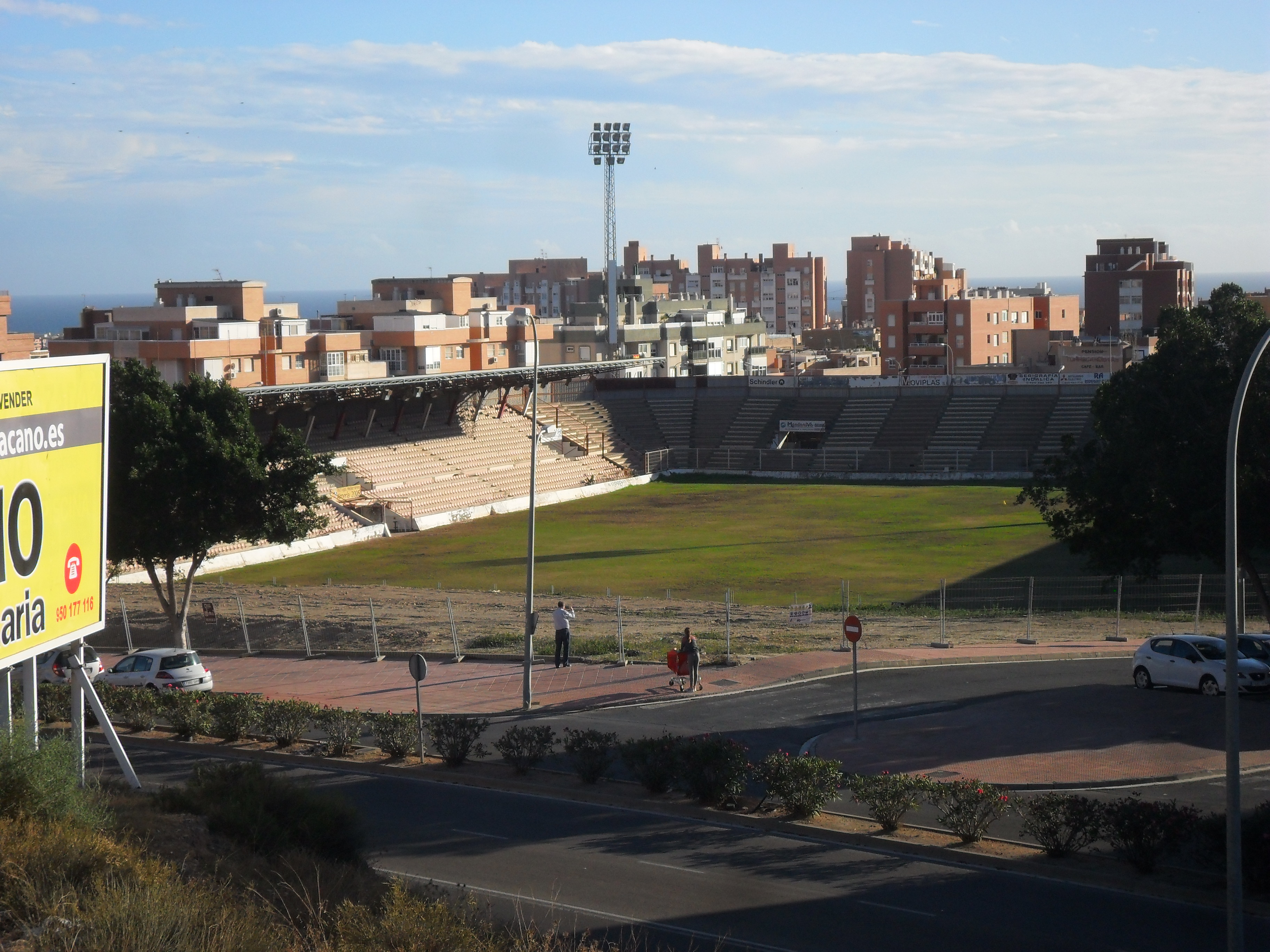 Estadio Juan Rojas en Almería